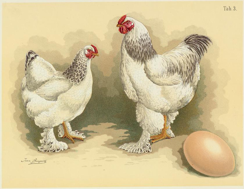 Brahmapoutra-Huhn. Gallus dom. gigant. crenulato-pectin. Brahma Pootra-fowl. Brahma-Pootra.